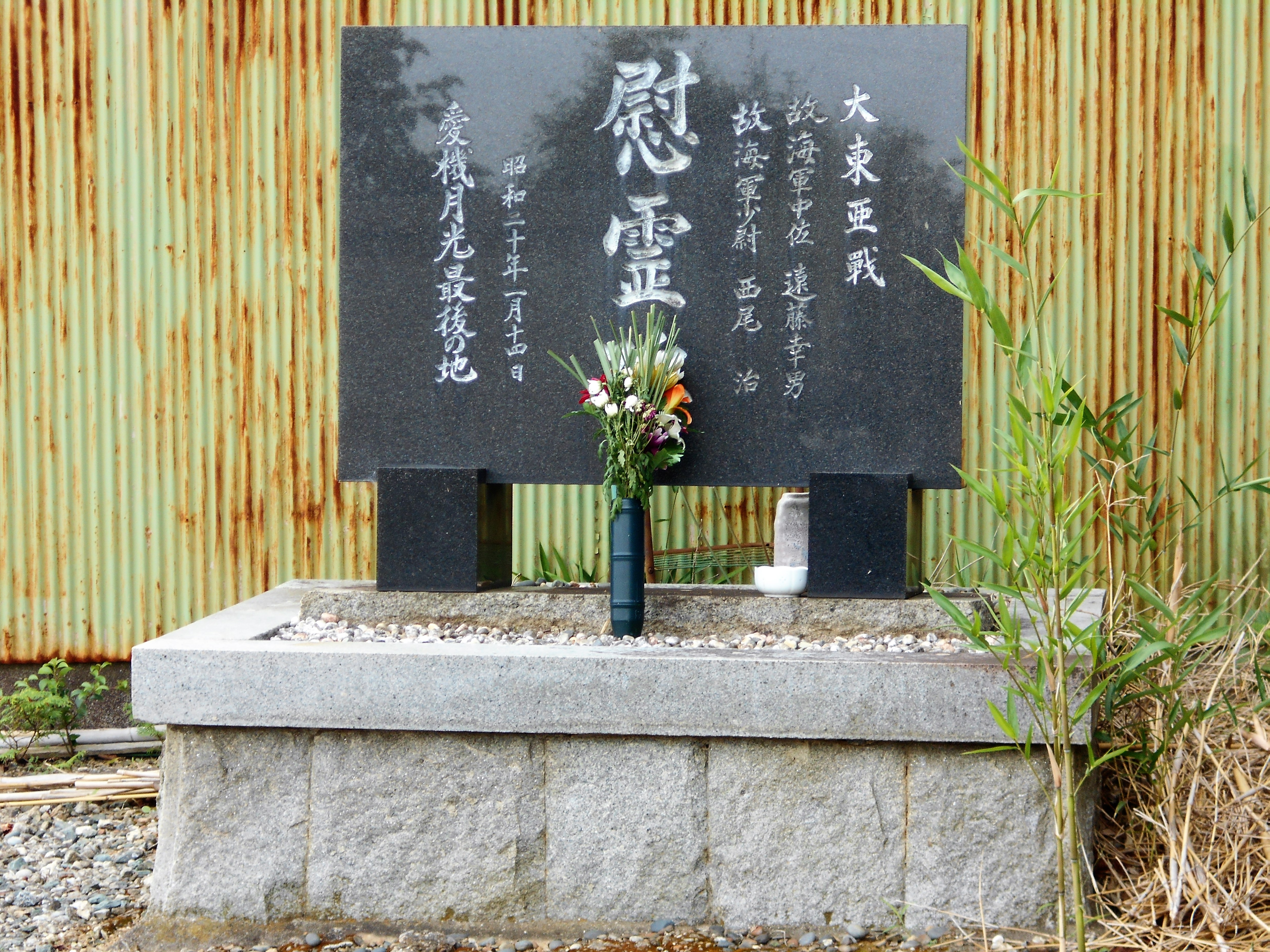 遠藤幸男海軍中佐と西尾治海軍少尉の慰霊碑（愛知県田原市神戸町、2017年8月）